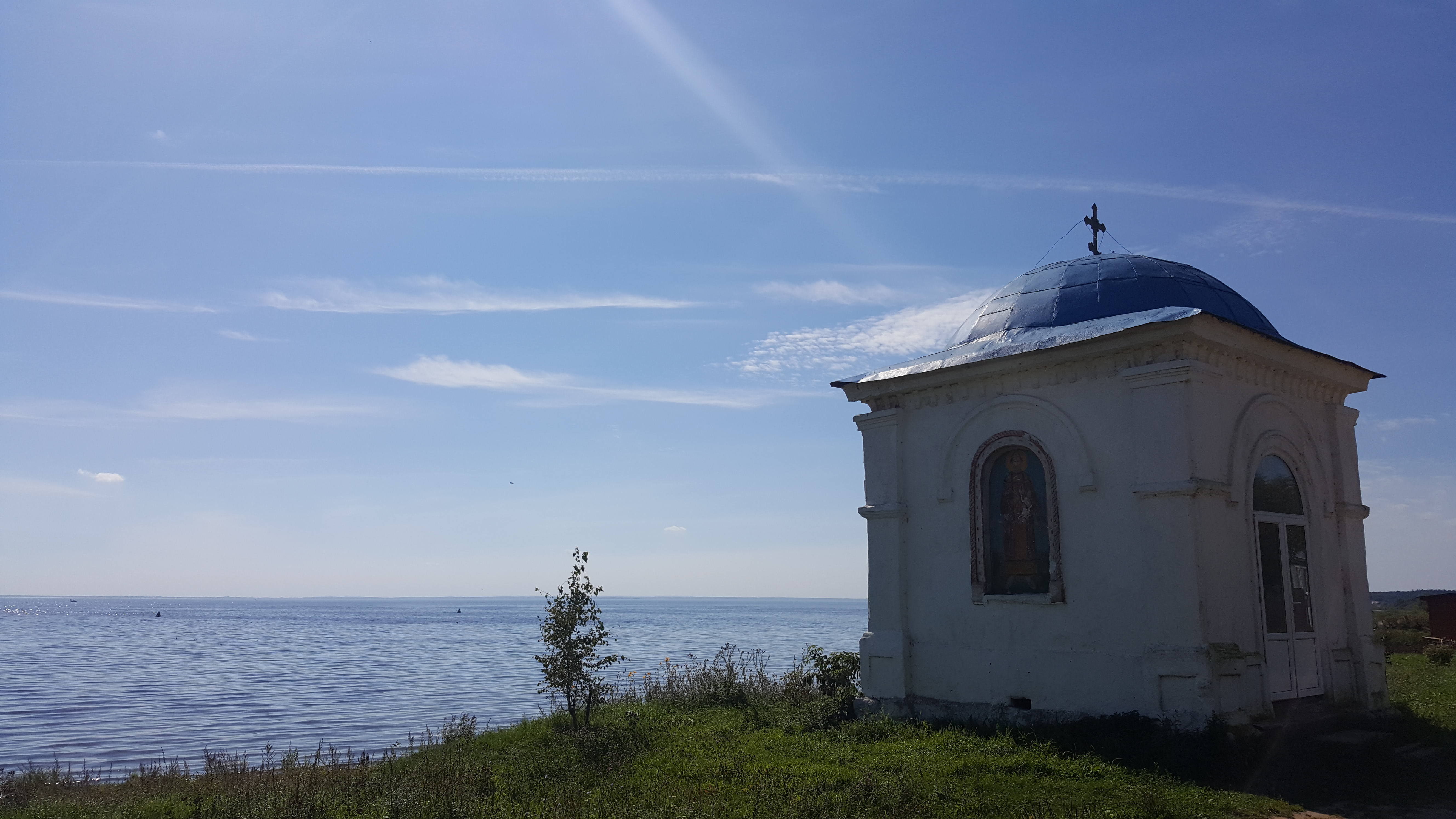 Церковь Никольская: остров им. Залита, Псковский район, Псковская область